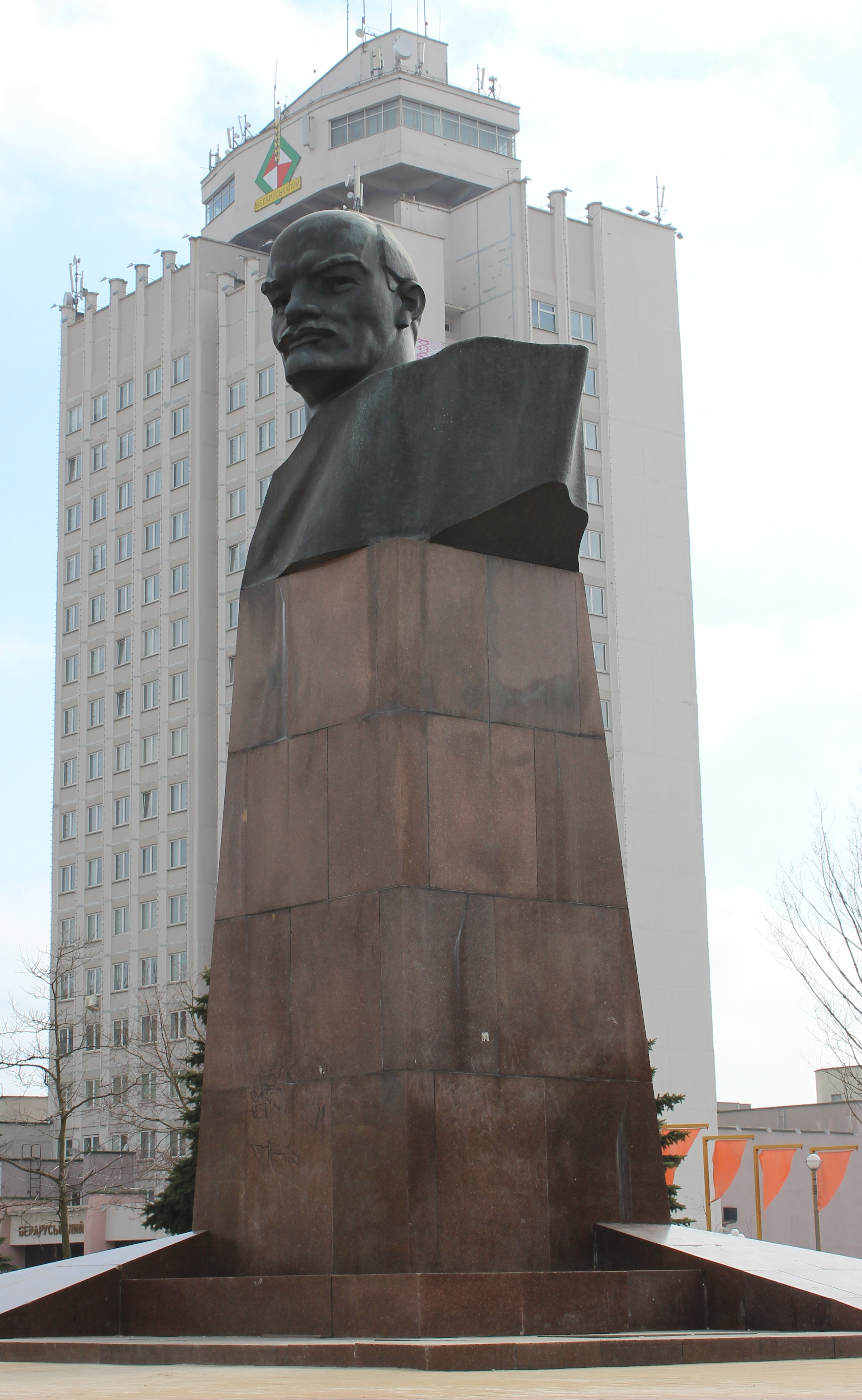 Памятник В.И. Ленину в городе Солигорск